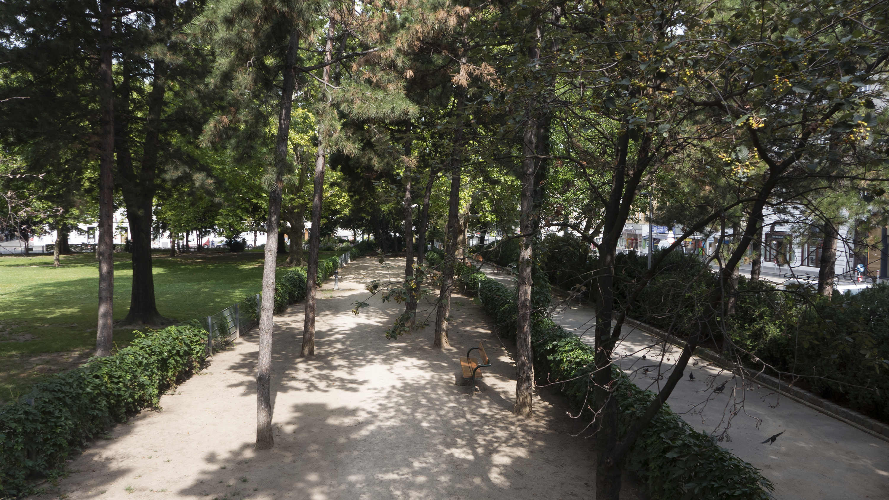 Arne-Carlsson-Park in Wien 9